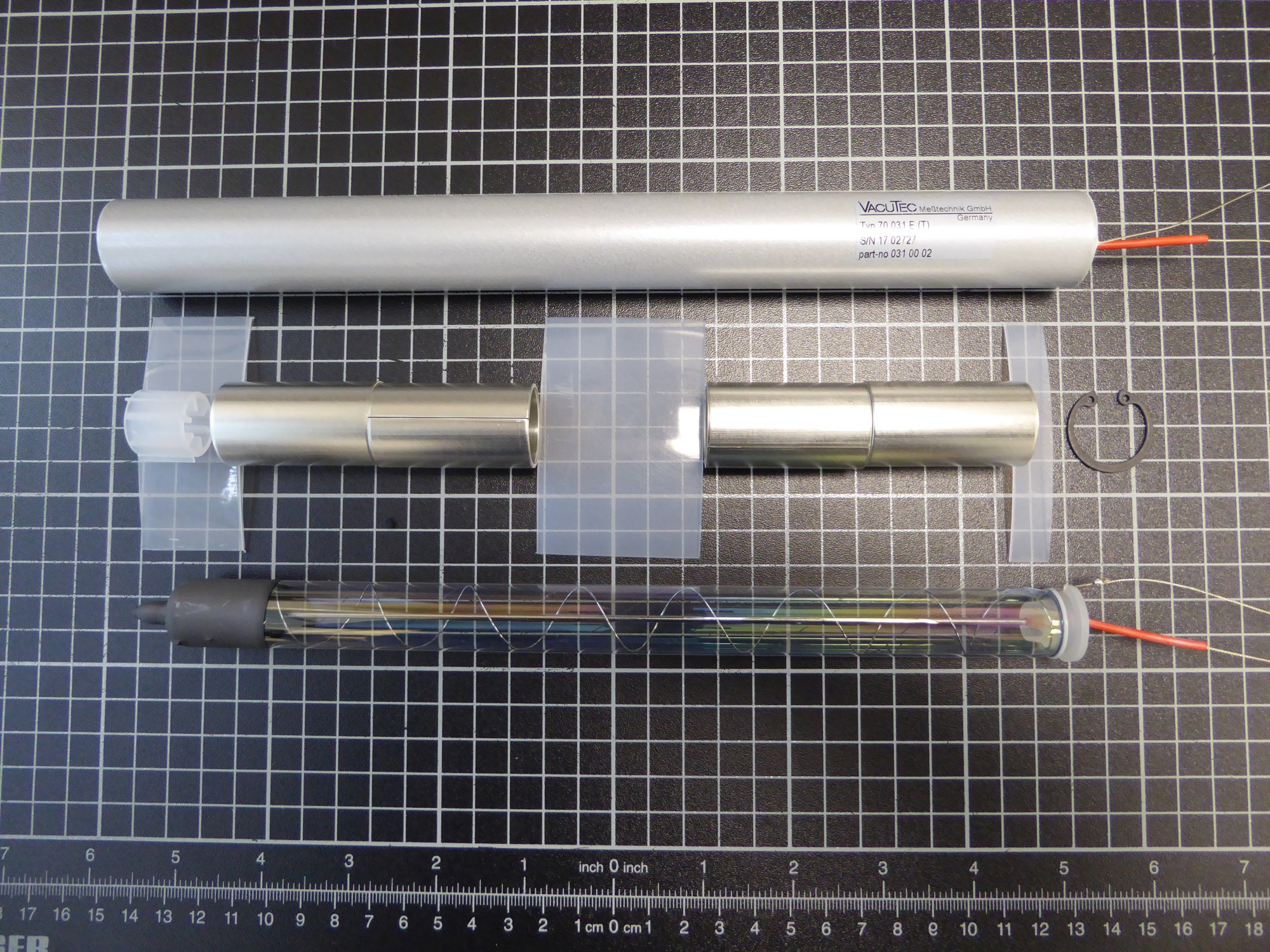 VacuTec Geiger-Müller Zählrohr